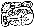 Majų glifas, simbolizuojantis miestą Calacmul. Padarytas naudojant freeware Maya font.